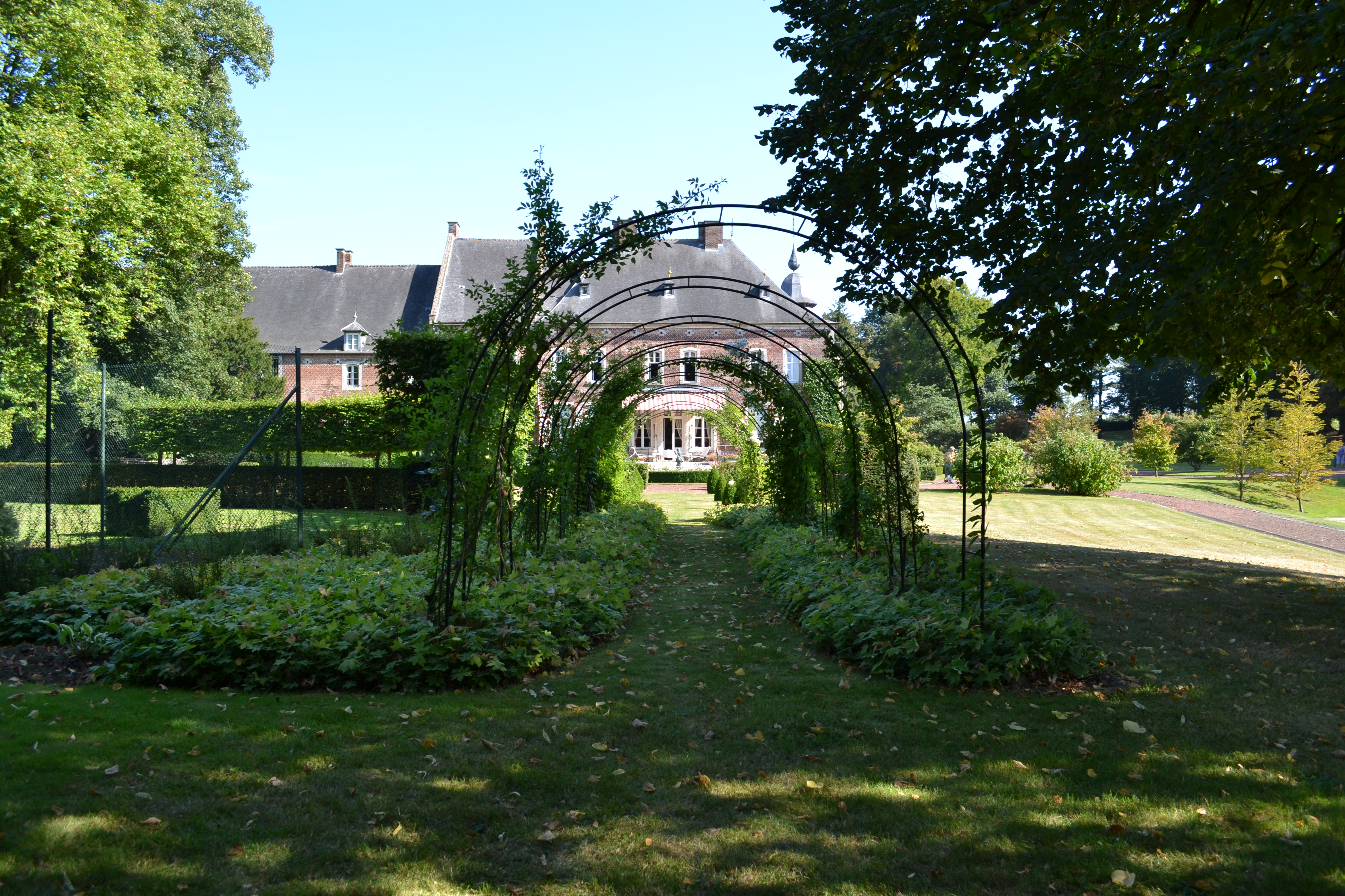 Château de Jodoigne-Souveraine lors des journées du patrimoine 2012